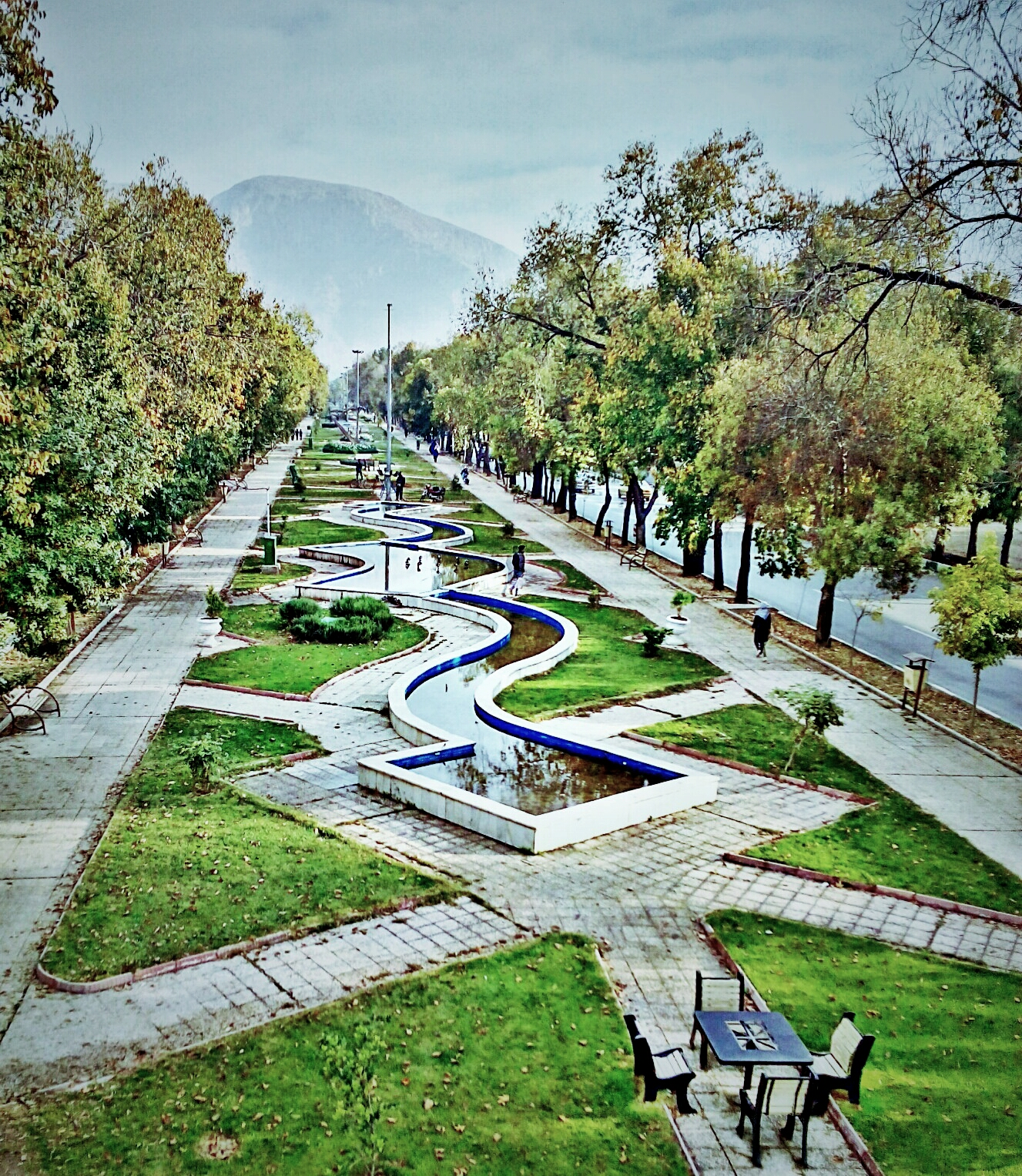 بلوار شهید شیرودی (طاق بستان) واقع در شهر کرمانشاه ، ایران... این نگاره نسخه ویرایش شده پرونده Bolvartaq.jpg میباشد...